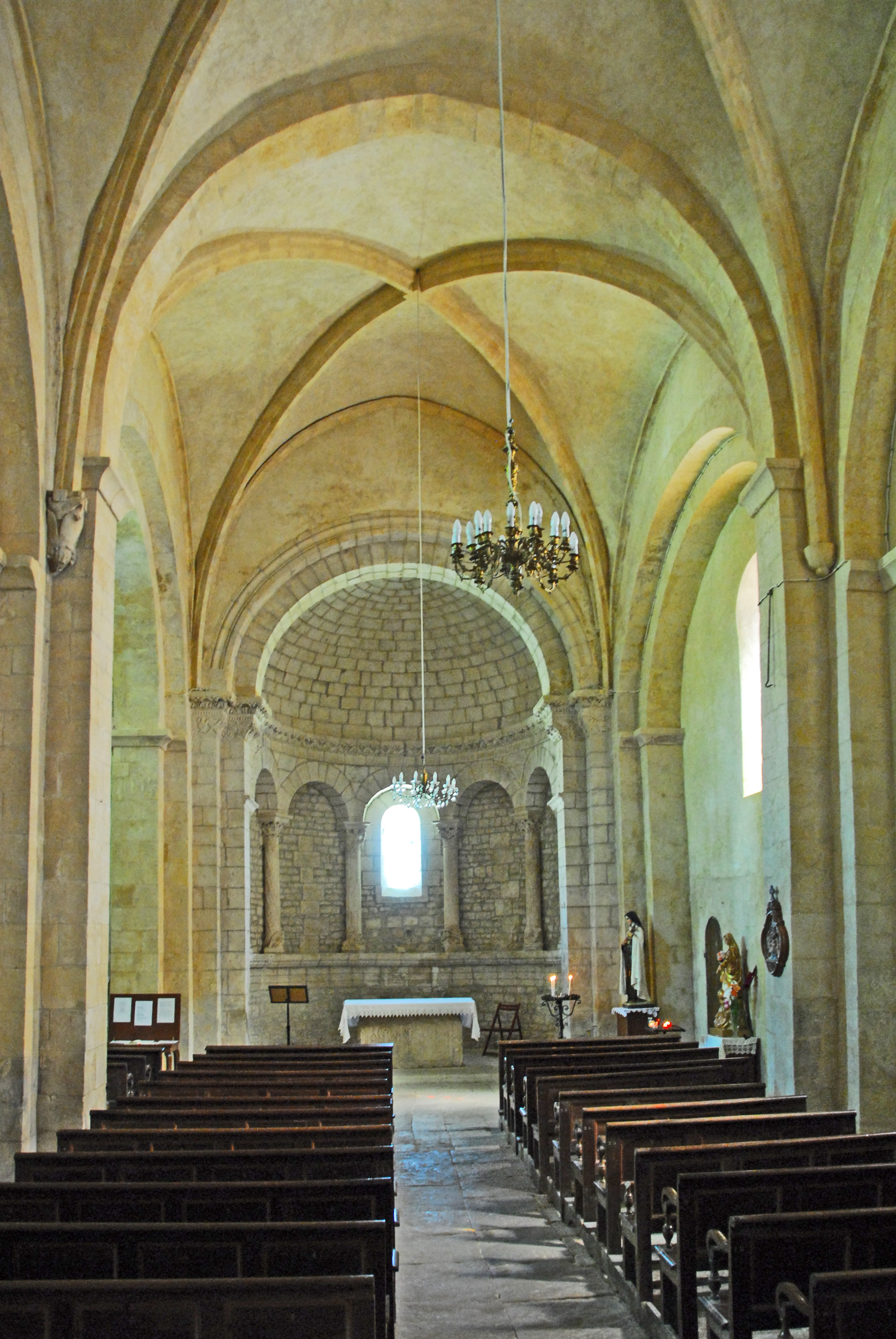 N-D et St-Christophe de St-Christol, Hauptschiff zum Chor